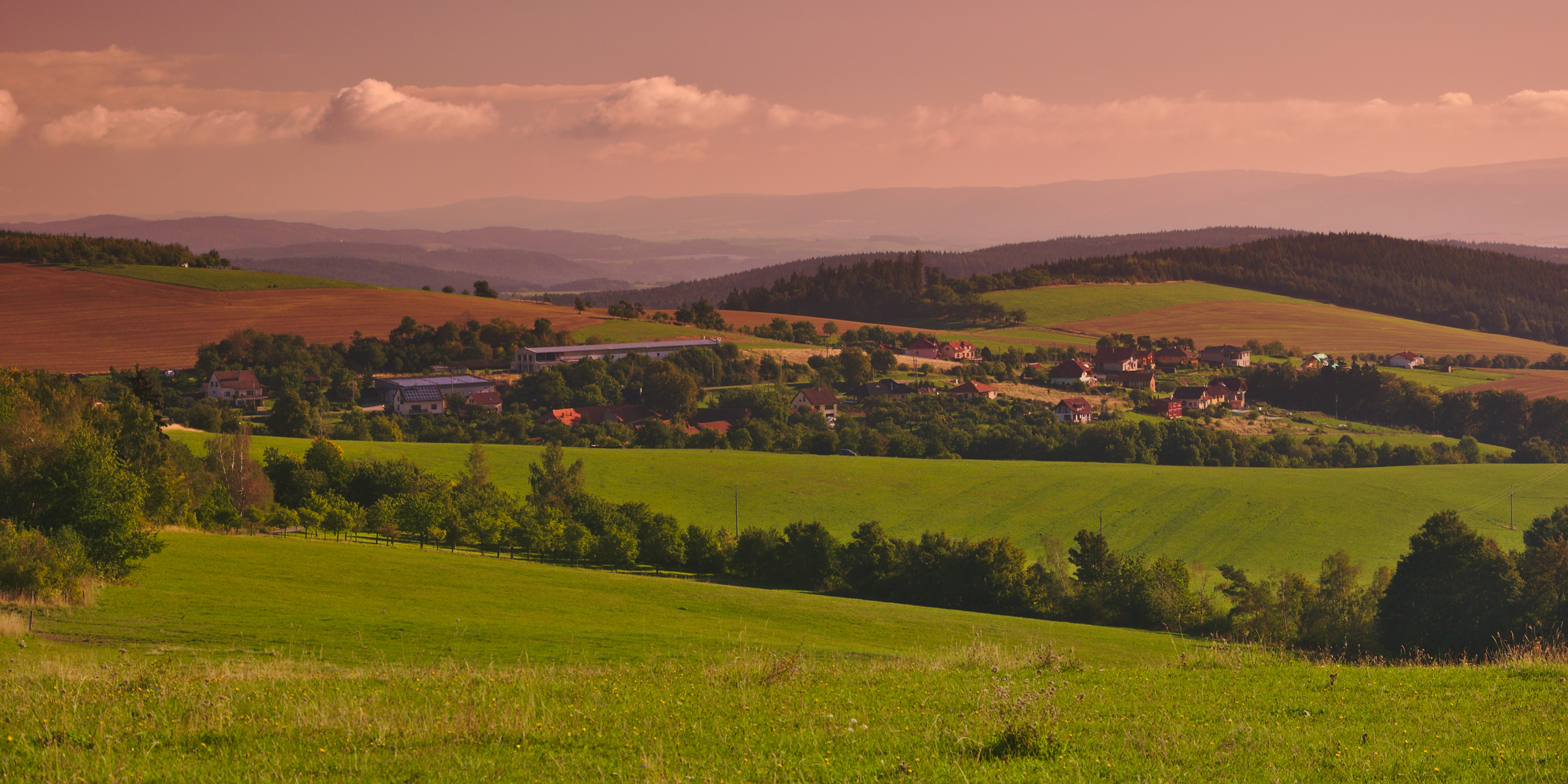 Pohled na obec od jihu, Kunice, okres Blansko